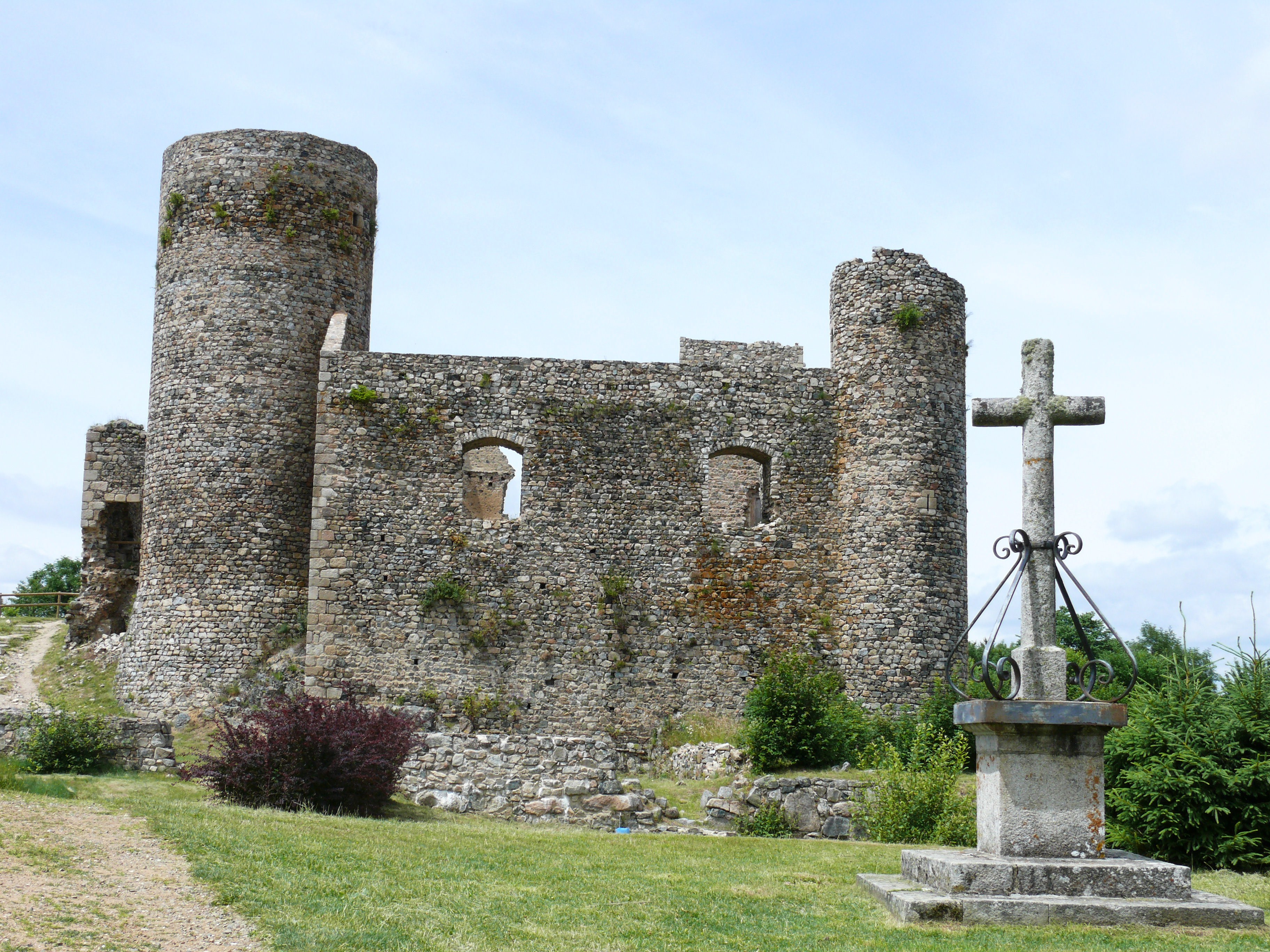 Champoly - Château des Cornes d'Urfé